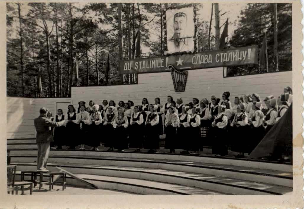 Vana foto Keilast.